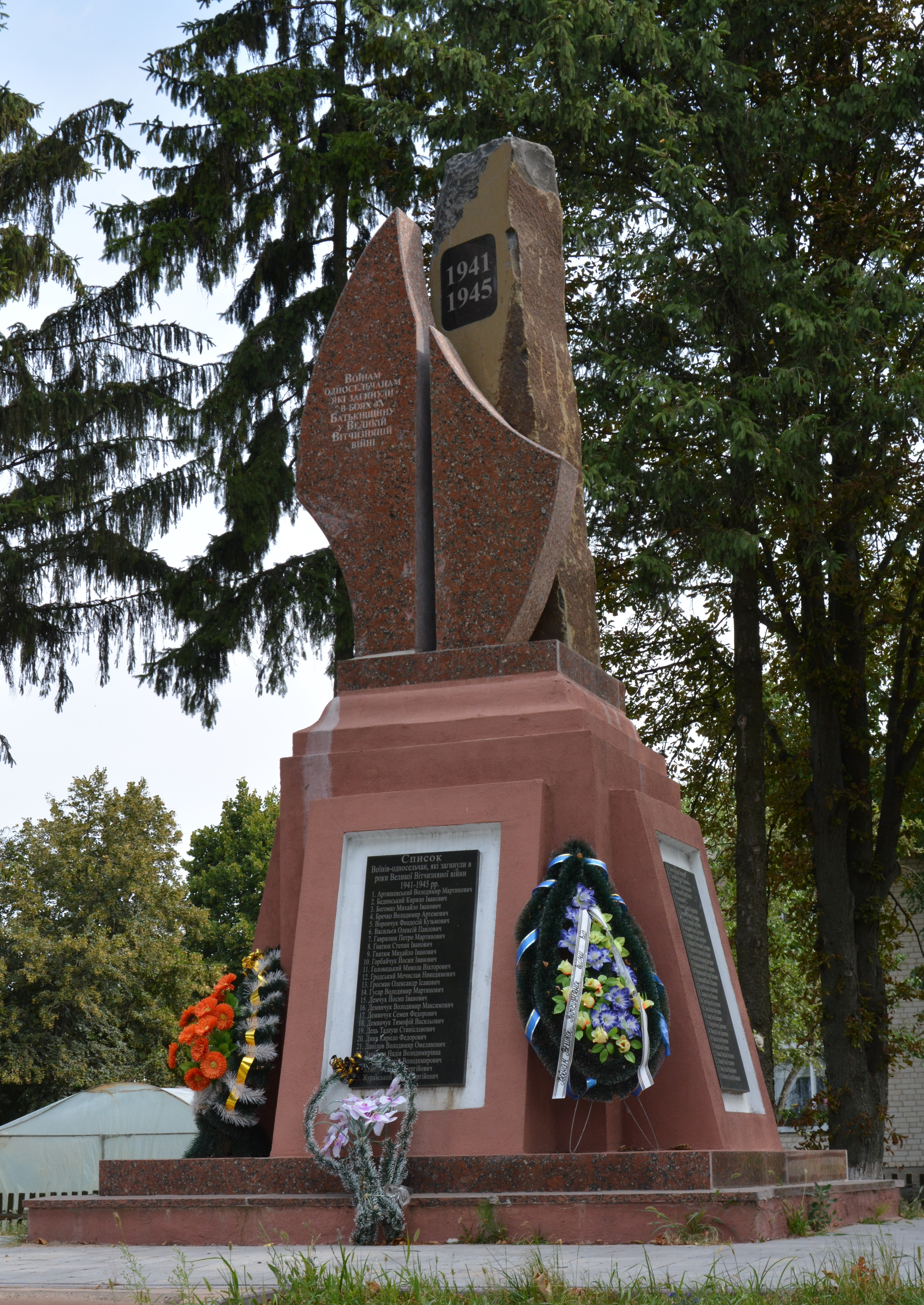 Пам’ятник землякам, Копачівка